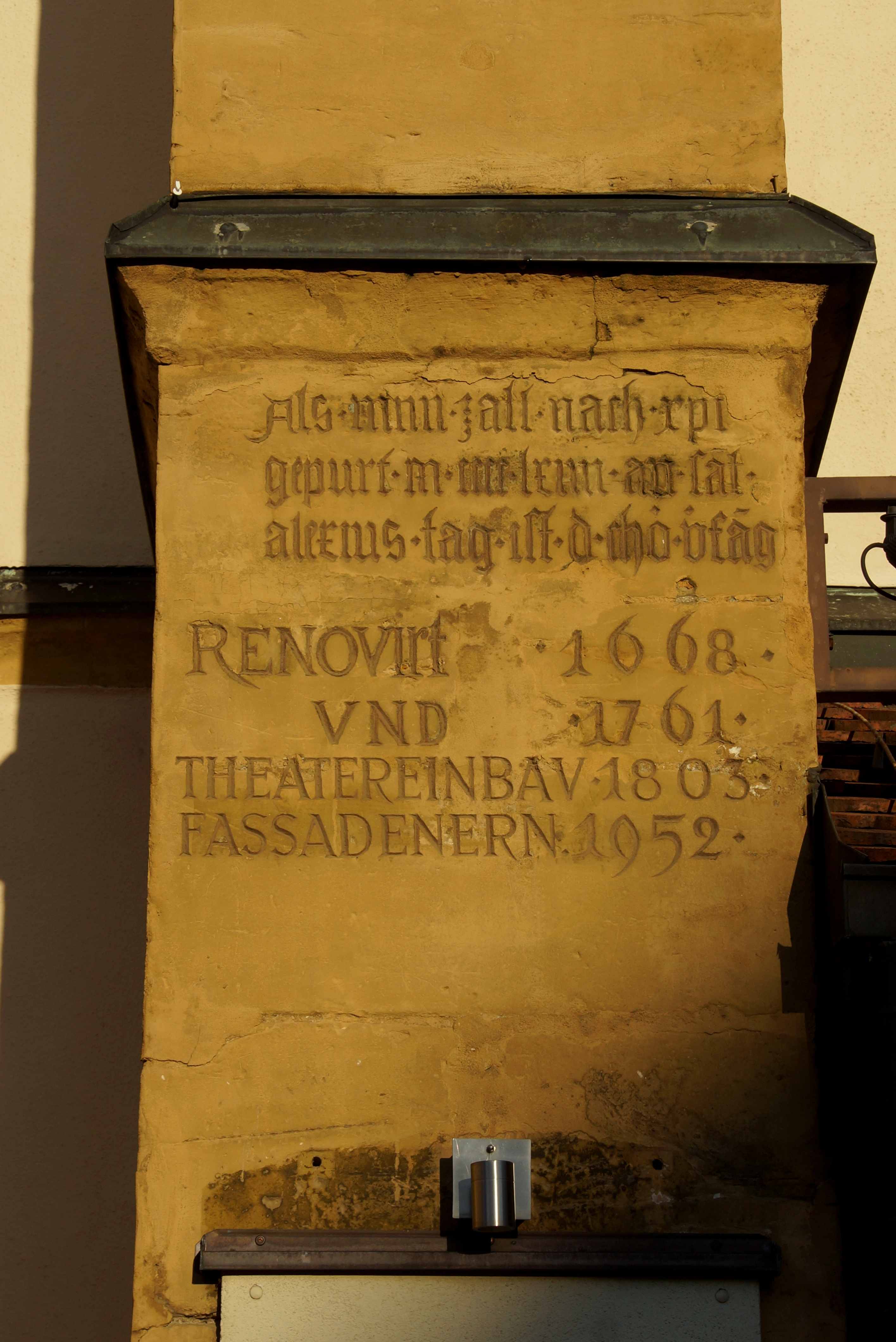 Das jetzige Stadttheater in Amberg war ursprünglich die Klosterkirche eines Franzikanerklosters